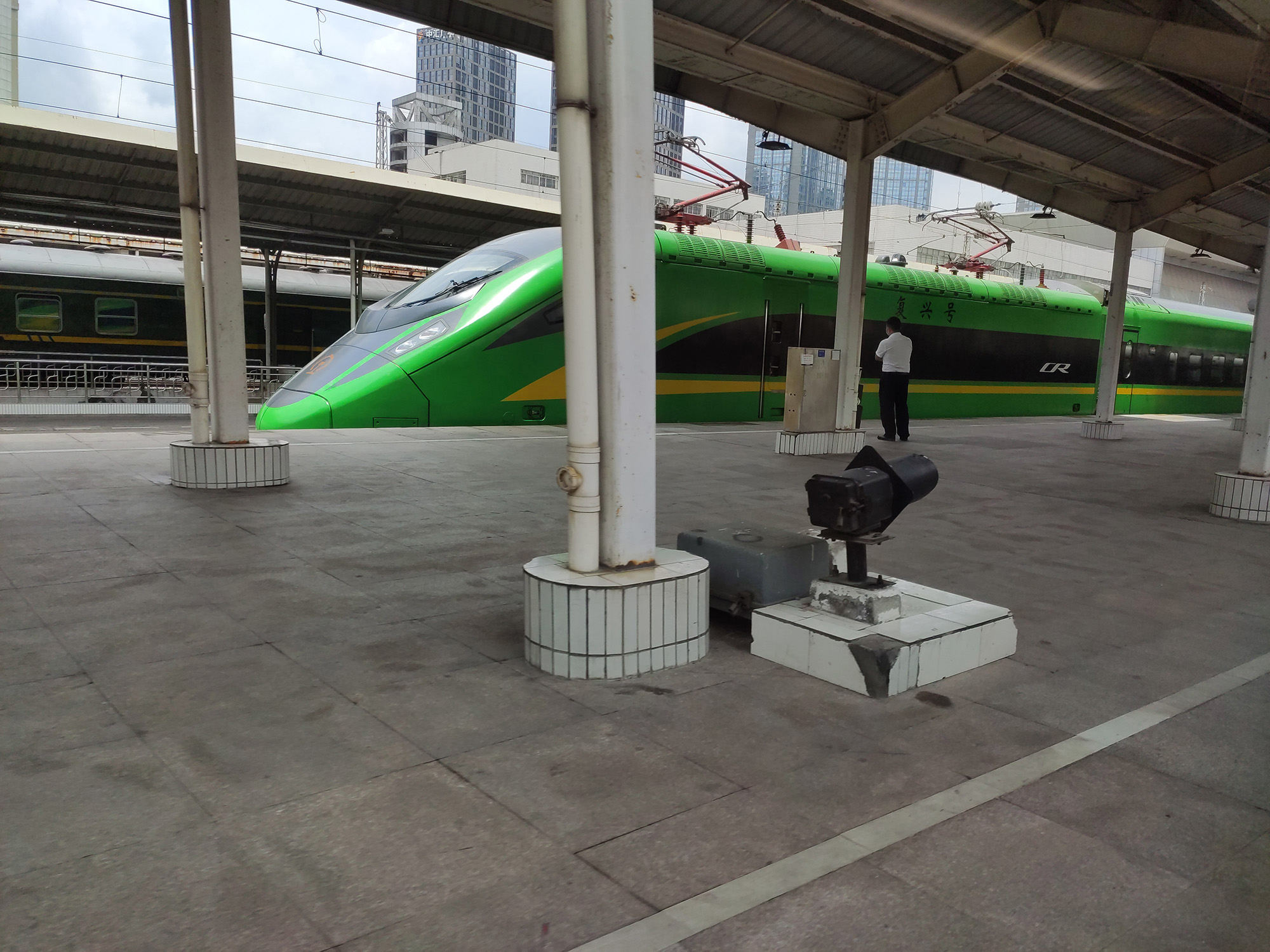 京深动集CR200J从广州东动车所出库后停靠广州东站